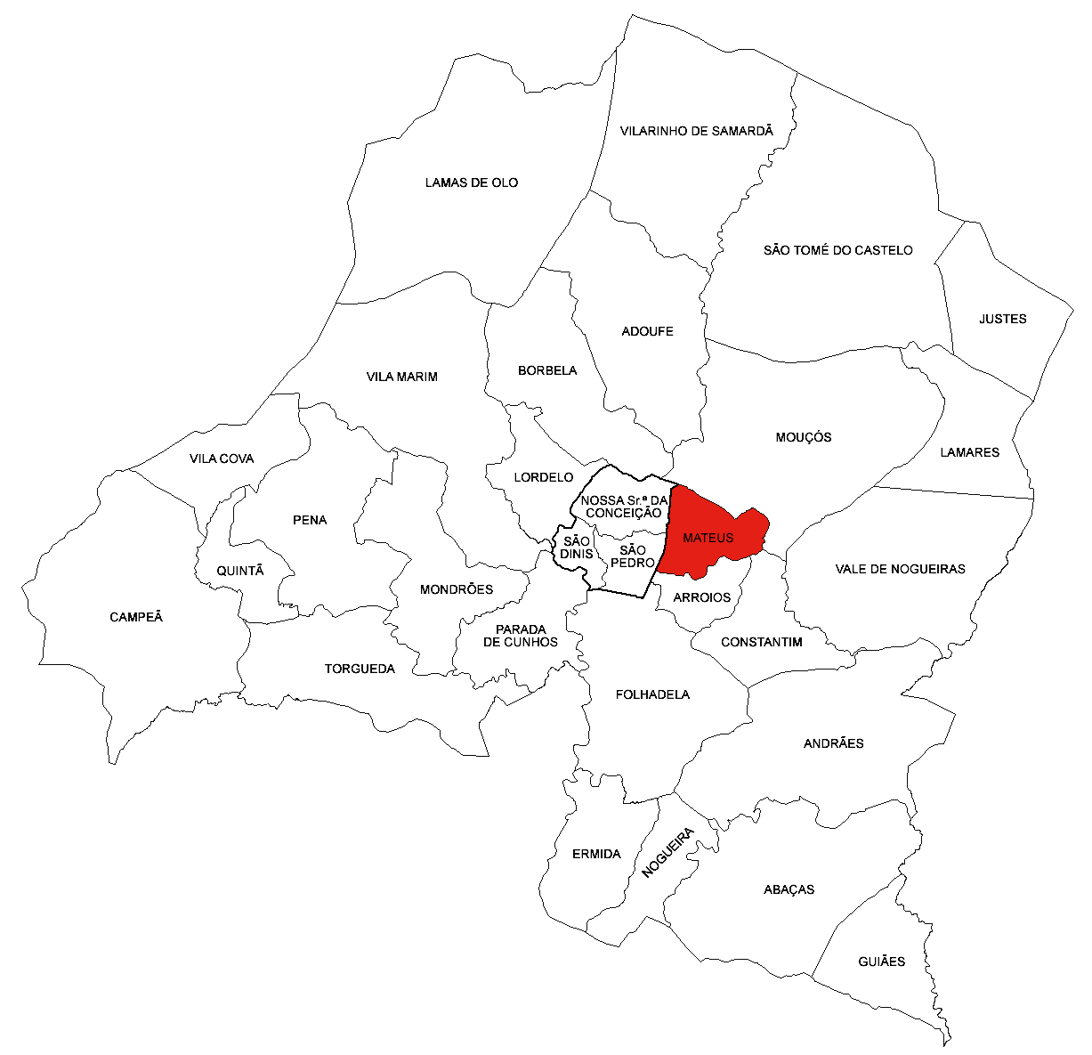 Freguesia de Mateus (concelho de Vila Real)